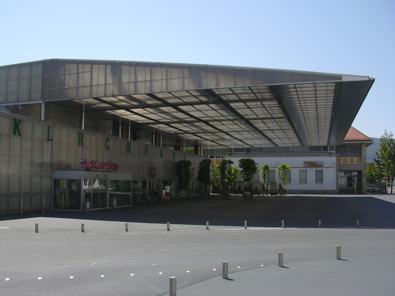 Kirchpark in Lustenau mit Vordach über dem blauen Platz